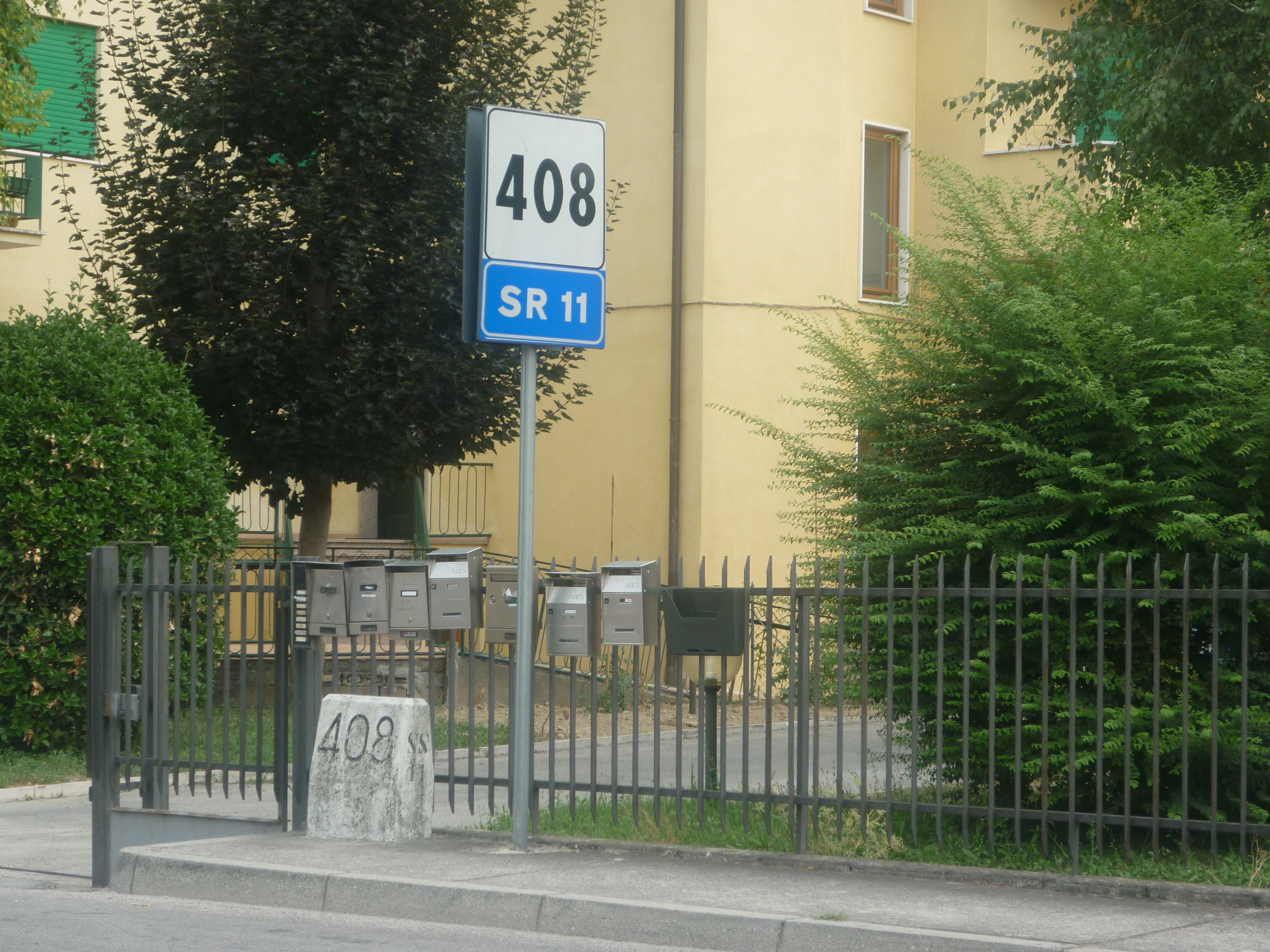 sr11